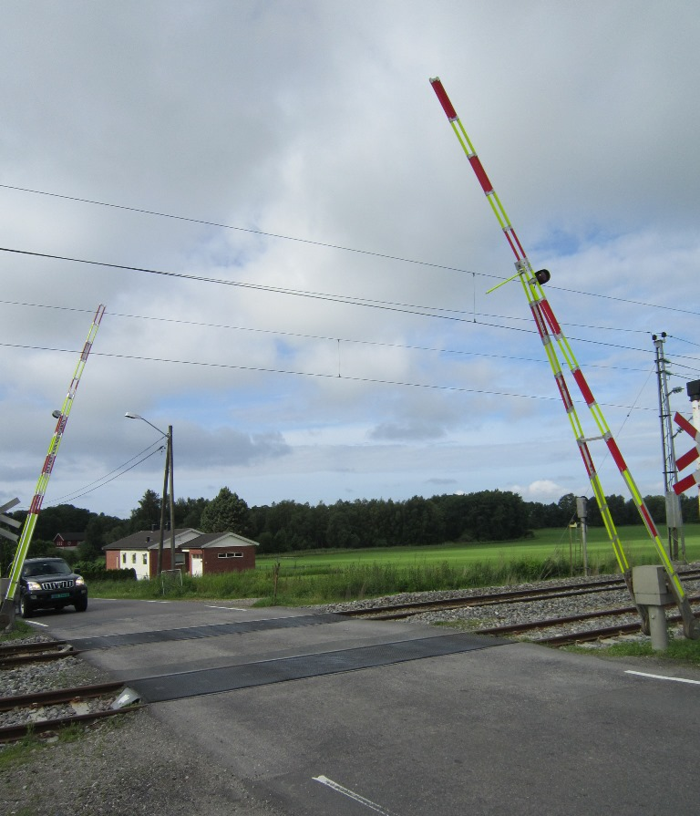 Fylkesvei 119 krysser Østfoldbanenved Dilling stasjon.